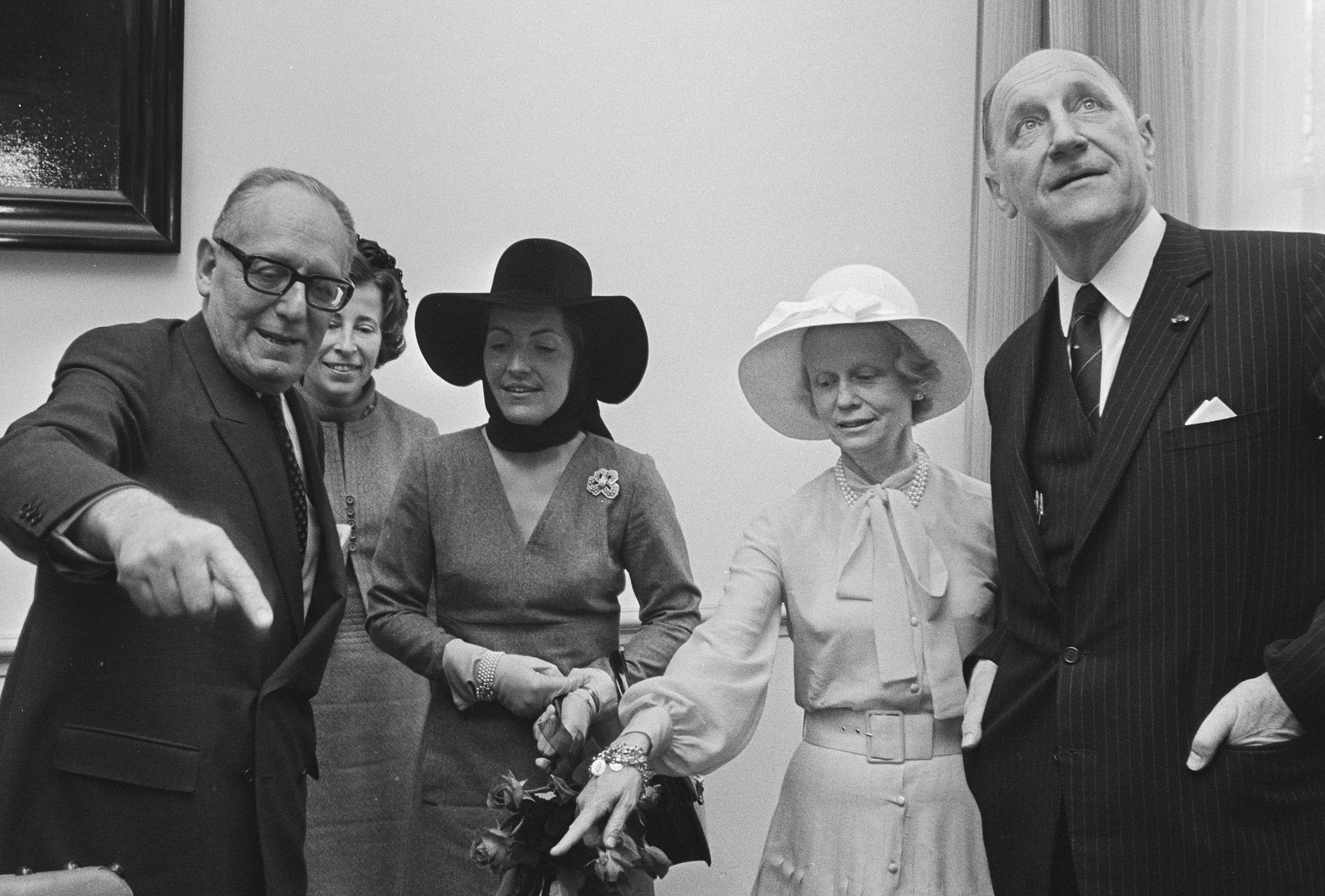 Collectie / Archief : Fotocollectie Anefo Reportage / Serie : Opening door prinses Margriet van het Institut Francais in het voormalige Beschrijving : V.l.n.r. Maurice Schumann (Franse minister van Buitenlandse Zaken), prinses Margriet, Lucie Schumann, Joseph Luns (Nederlandse minister van Buitenlandse Zaken) Datum : 18 maart 1971 Locatie : Amsterdam, Noord-Holland Trefwoorden : gebouwen, ministers, openingen, prinsessen Persoonsnaam : Luns, Joseph, Margriet, prinses, Schumann, Lucie, Schumann, Maurice Fotograaf : Fotograaf Onbekend / Anefo Auteursrechthebbende : Nationaal Archief Materiaalsoort : Negatief (zwart/wit) Nummer archiefinventaris : bekijk toegang 2.24.01.05 Bestanddeelnummer : 924-3623